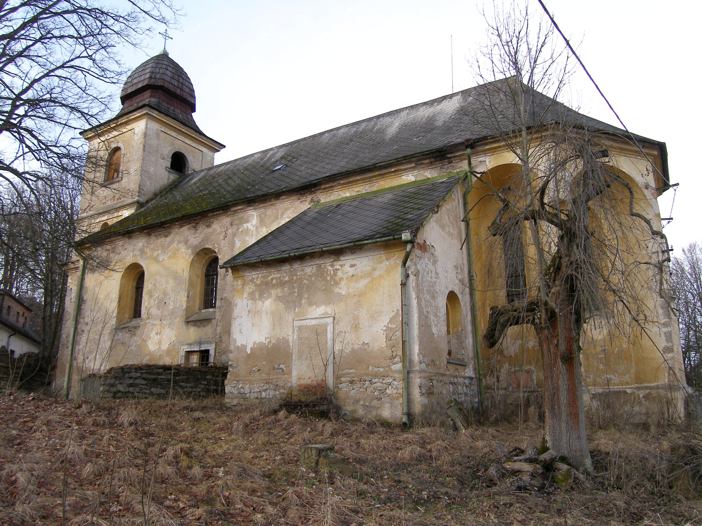 Vidžín (ČR, okres Plzeň-sever), filiální farní kostel sv. Jakuba Většího.